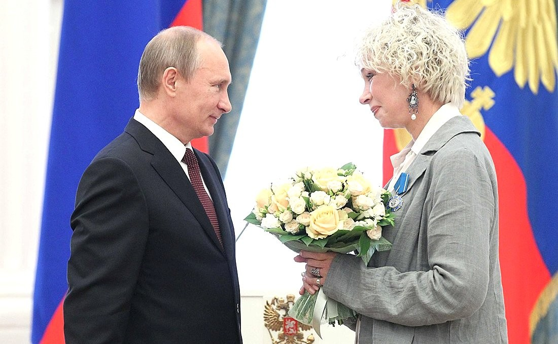 Орденом Почёта награждена артистка театра и кино Татьяна Васильева